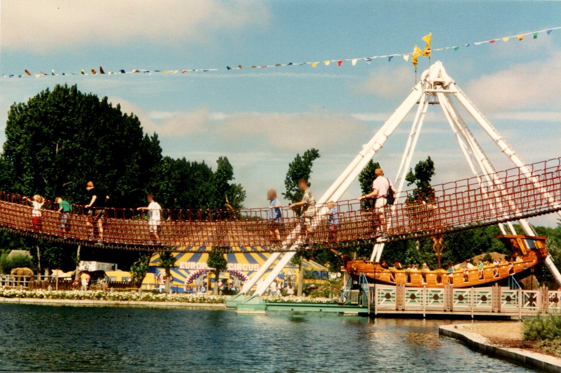 MeliparkLac